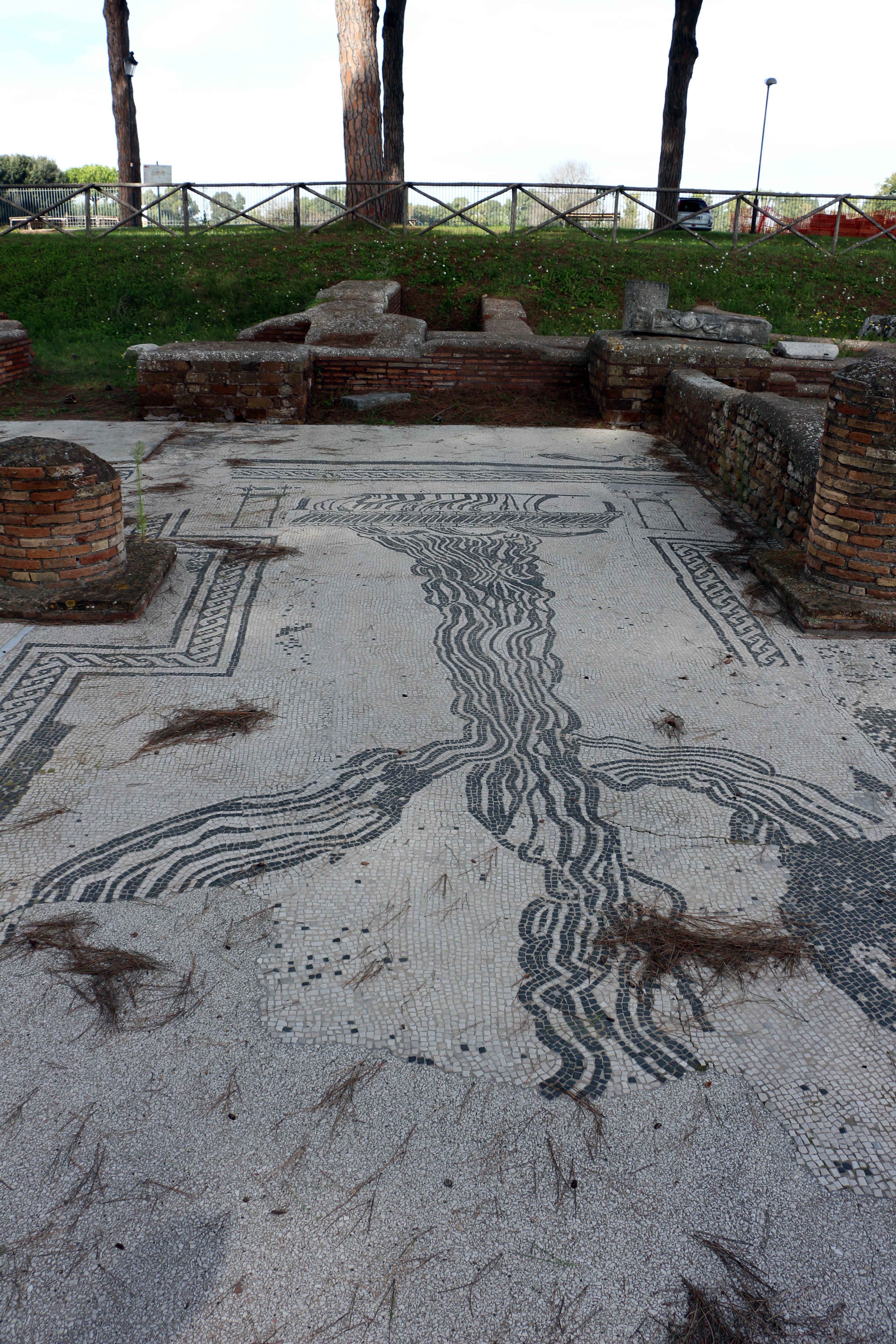 Ostia, piazzale delle corporazioni, foce del tevere.JPG